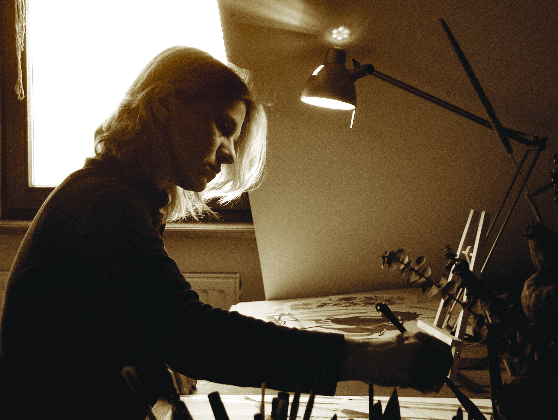 Małgorzata Flis przy pracy